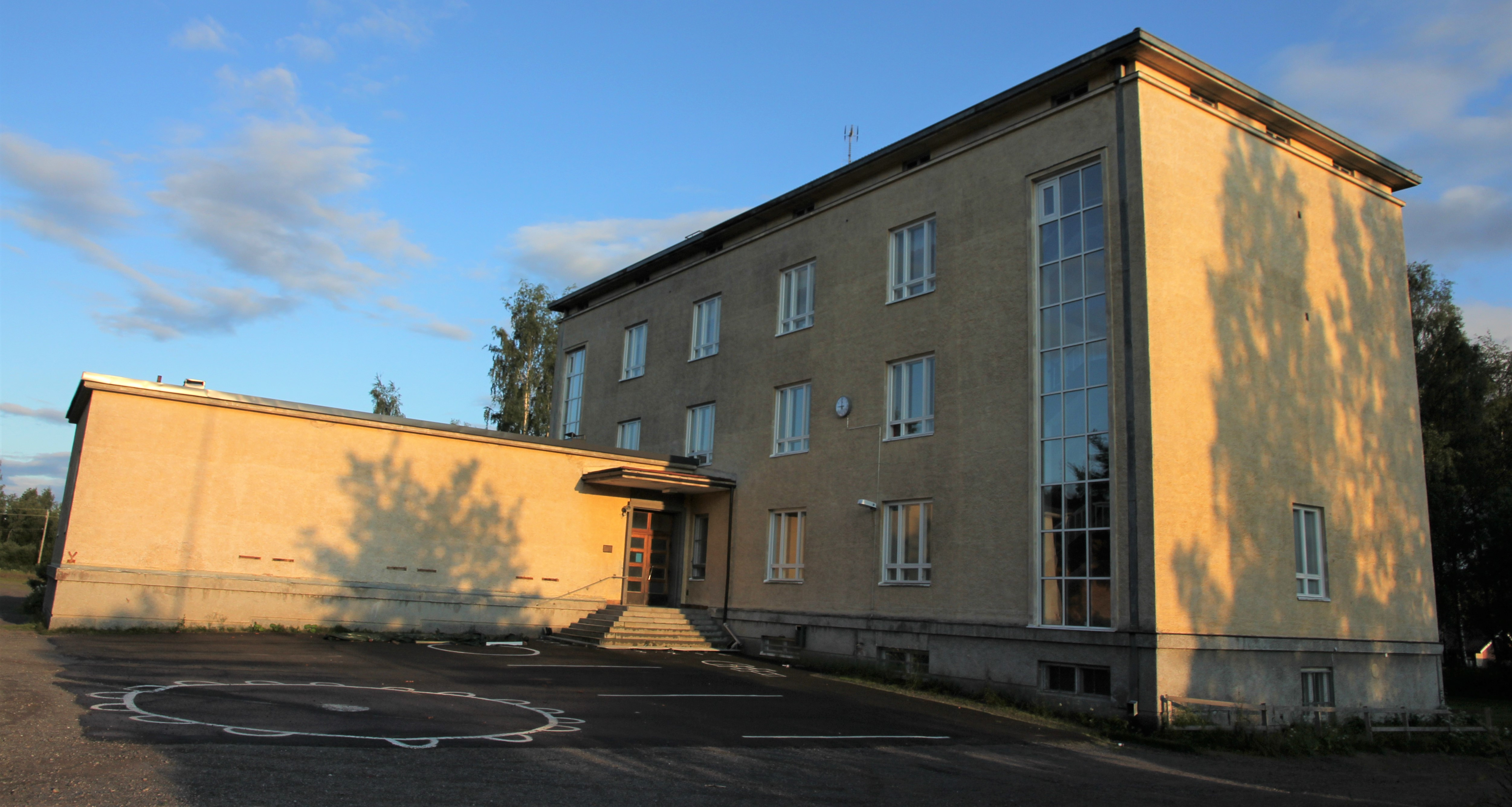 Puurtilan koulu on Varkauden Puurtilassa, Puurtilantie 21:ssä toimiva alakoulu.